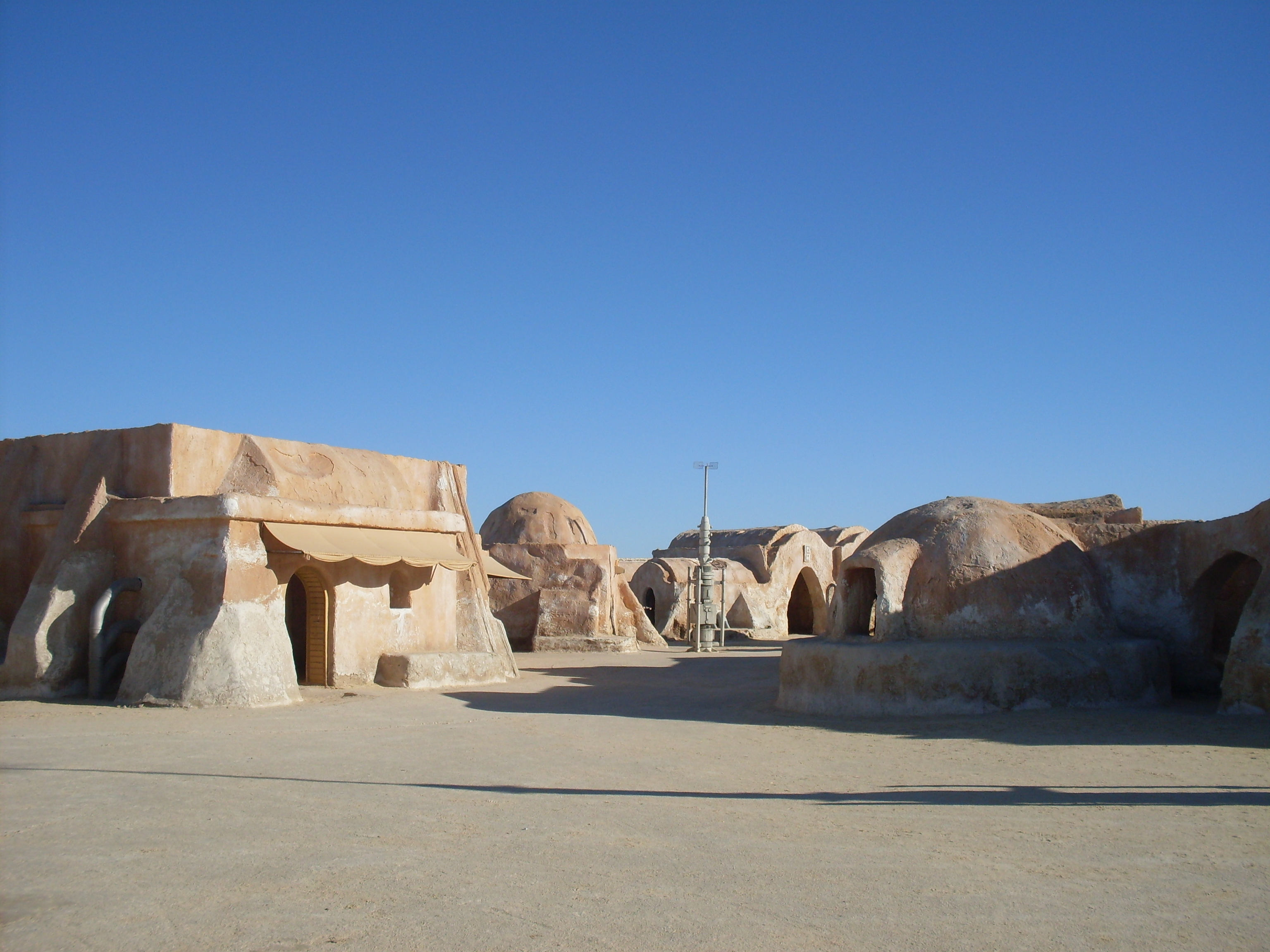 Tunisie: Décor de Star Wars aux environs de Tozeur